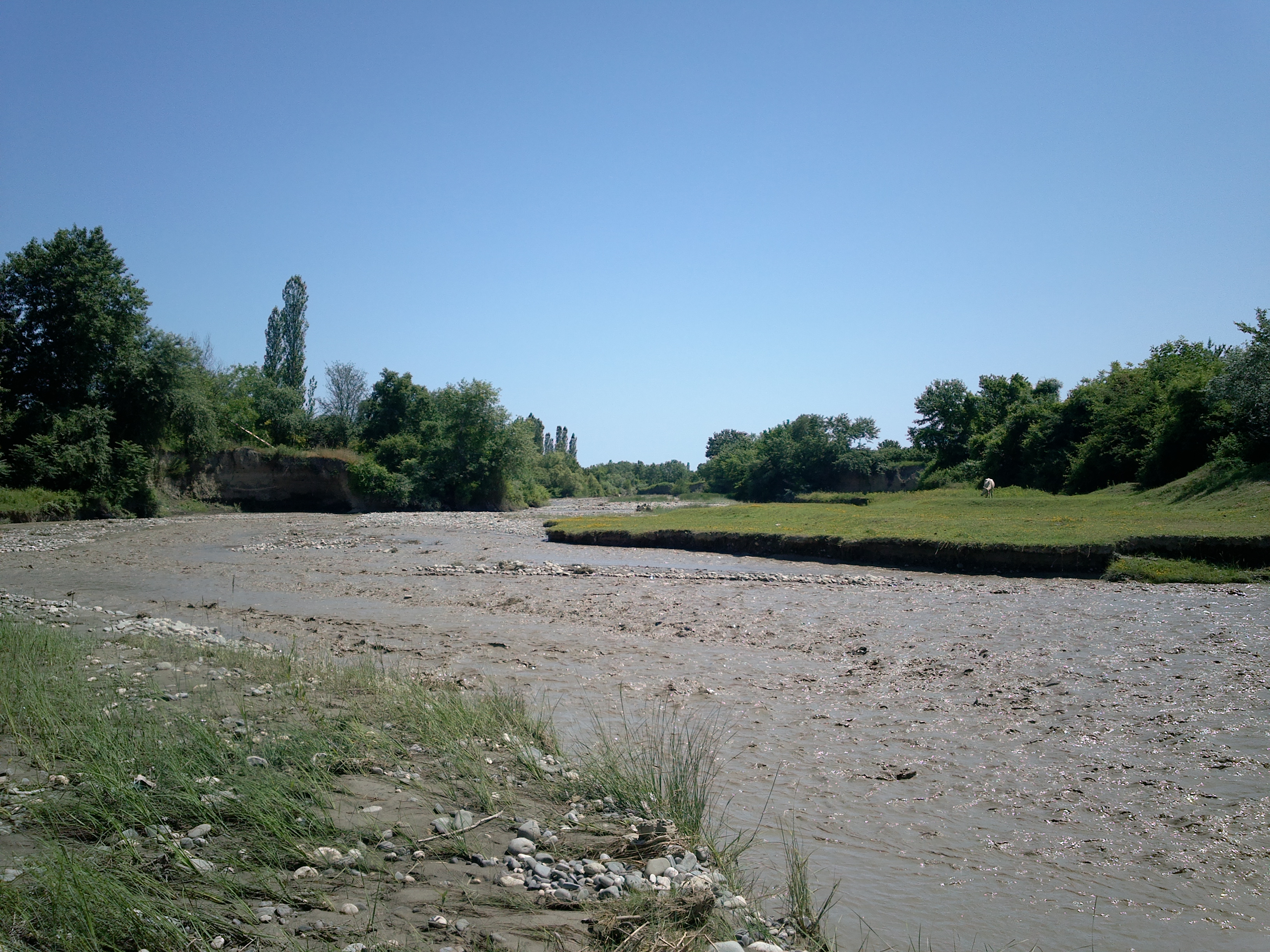 Hulovlu village, Khachmaz, Azerbaijan